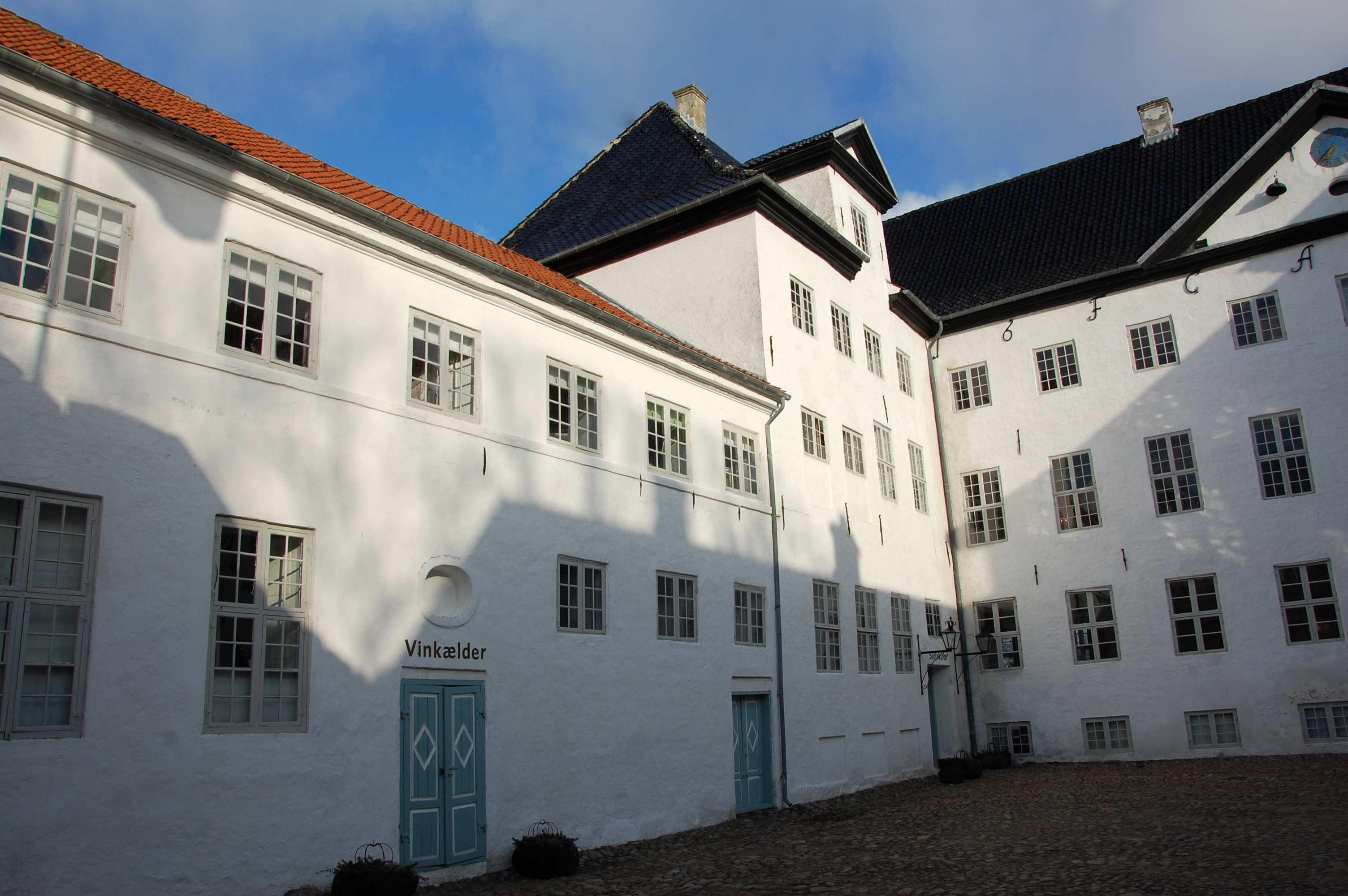 Schloss Dragsholm Innenhof